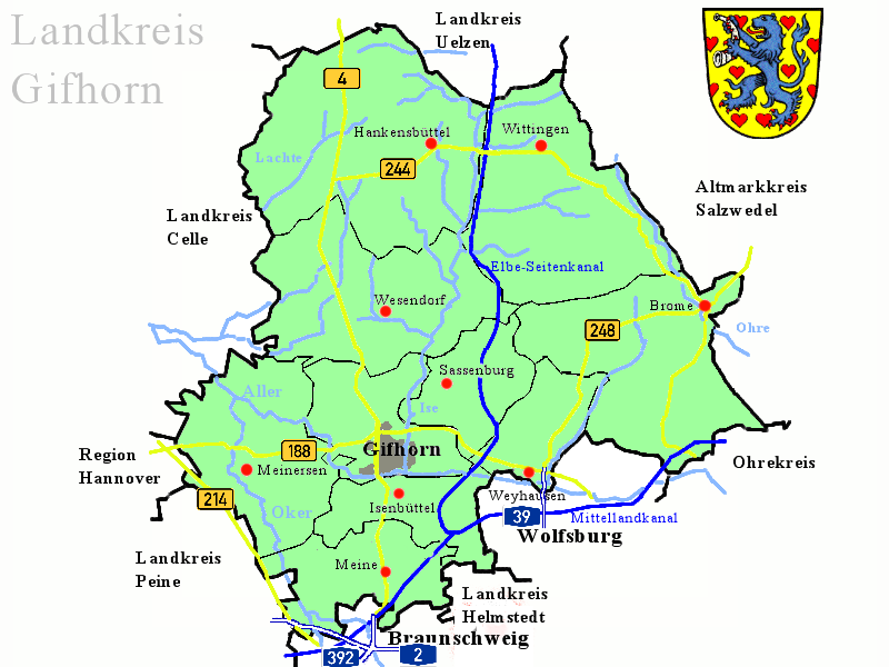 Landkarte des Landkreis Gifhorn und seinen Samtgemeinden mit Autobahnen, Bundesstraßen, Kanälen, Flüssen